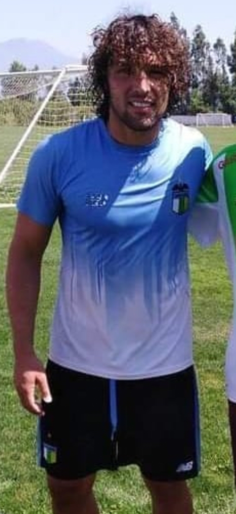 Equipo de Atletico Rafaela. Boca Junuors vs Atletico Rafaela. Futbol Argentino - Apertura 2011. 30 de octubre de 2011. Fecha 13. Estadio: Alberto J. Armando (Bombonera). Foto: Gaston Moreno / Photogamma.